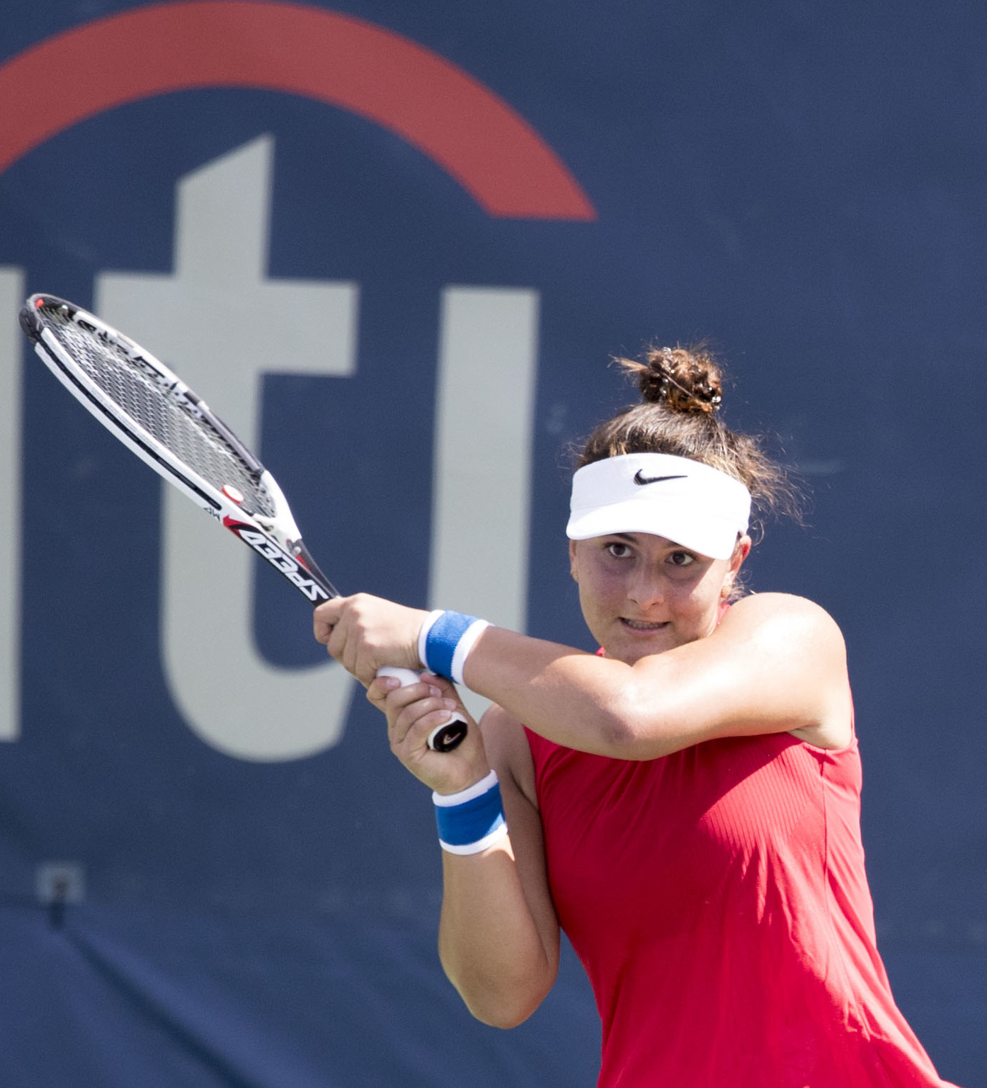 Citi Open Tennis 2017